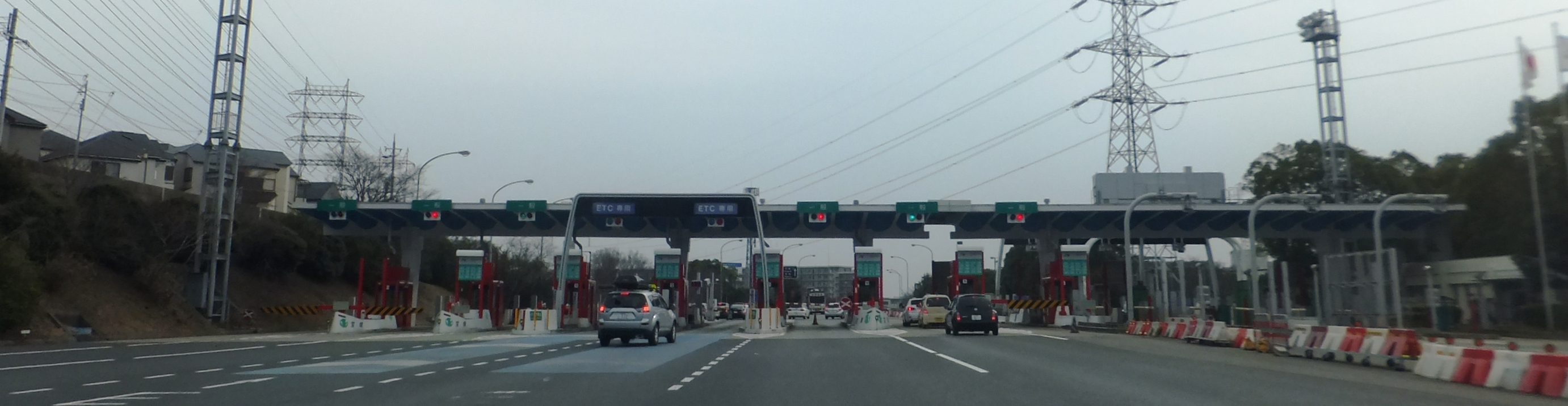 宝塚インターチェンジ